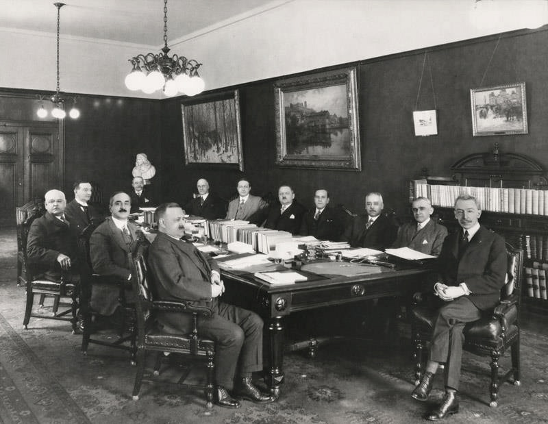 Le conseil des ministres du gouvernement Taschereau (Québec) vers 1927-1929. En commençant à la droite, dans le sens anti-horaire autour de la table : Louis-Alexandre Taschereau (Premier ministre ; procureur général ; Affaires municipales), Joseph-Édouard Caron (Agriculture), Antonin Galipeault (Travaux publics ; Travail), Athanase David (secrétaire), Émile Moreau (ministre sans portefeuille), Lauréat Lapierre (sans portefeuille), Alfred Leduc (sans portefeuille), Alfred Morisset (greffier du Conseil exécutif, non membre du conseil), Jacob Nicol (trésorier), Joseph-Léonide Perron (Voirie), Joseph-Édouard Perrault (Colonisation, Mines et Pêcheries), Honoré Mercier (fils) (Terres et Forêts).